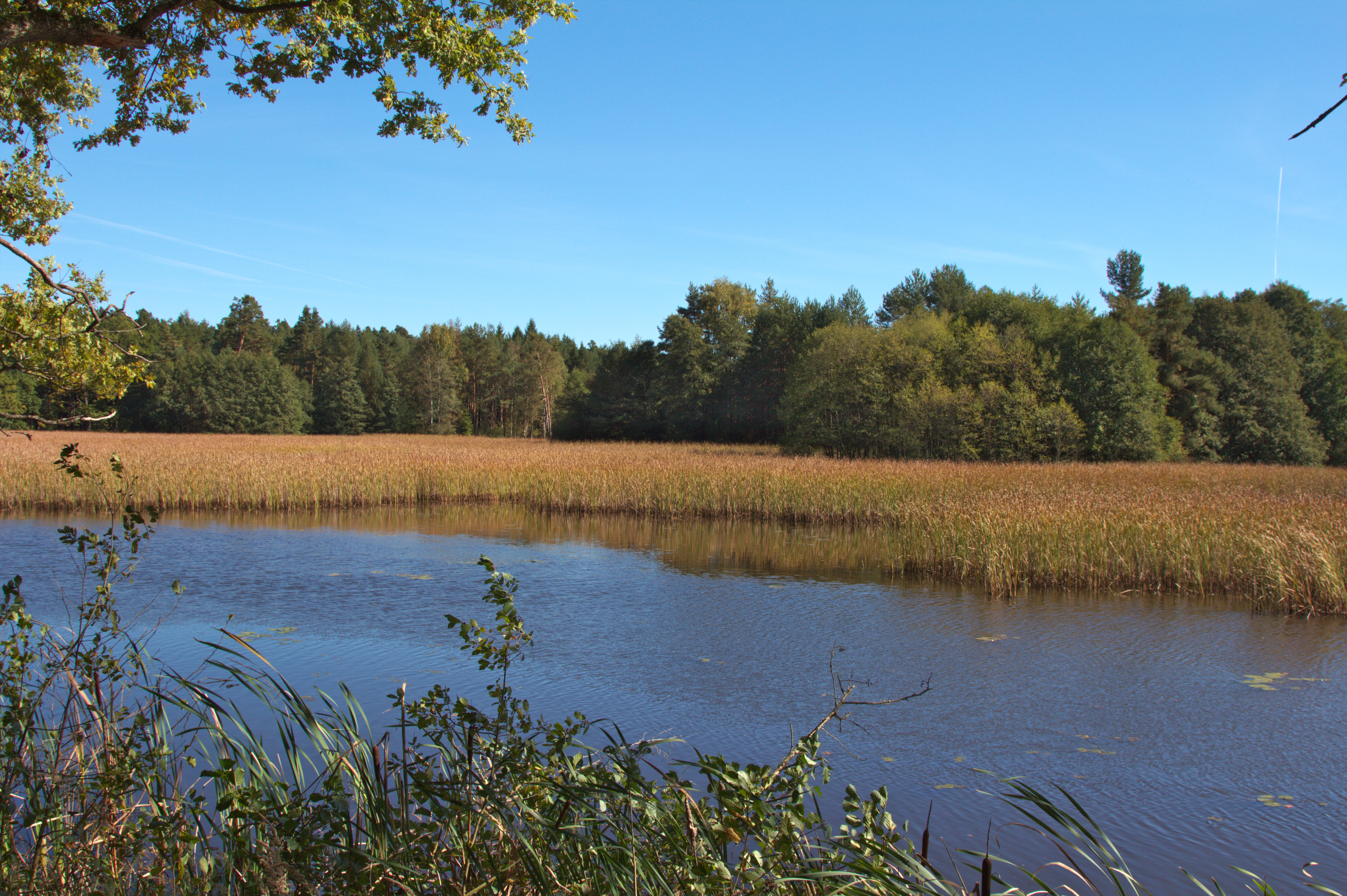 Vizír (národní přírodní památka)